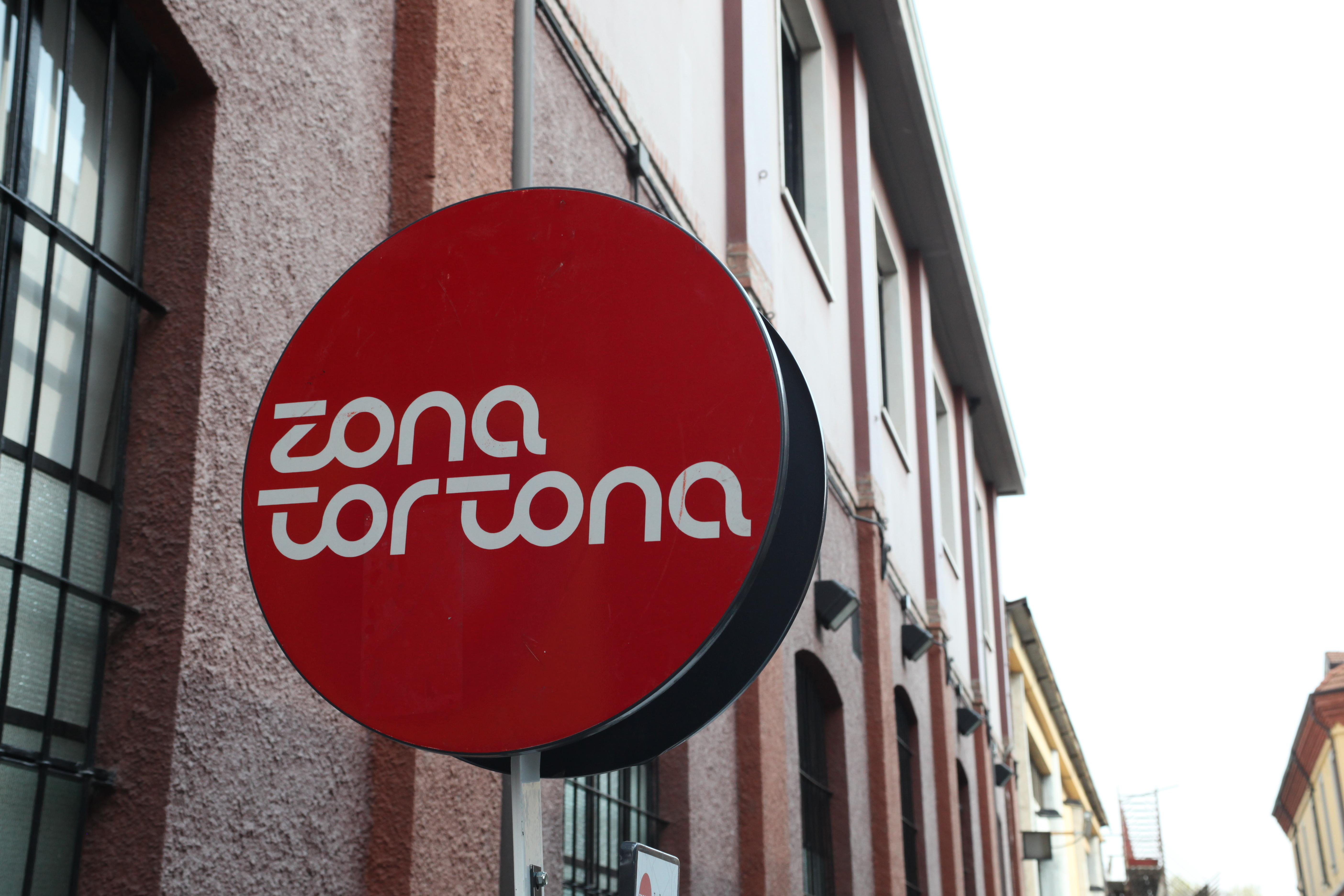 Segnaletica presente nella Zona Tortona a Milano – Italia.